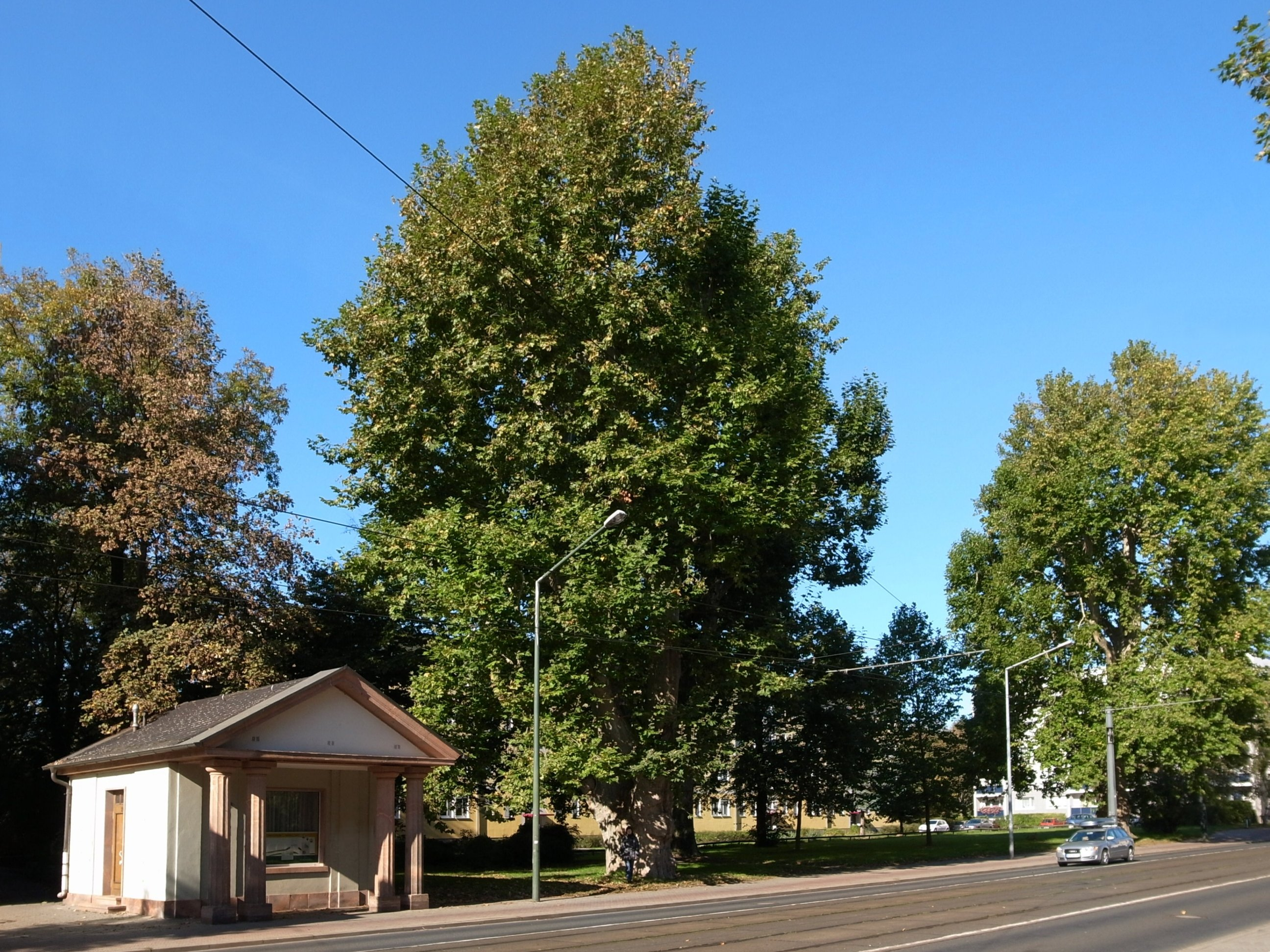 Dessau, Platanen am Rondell, angelegt 1781, Stammumfang bis 6 Meter